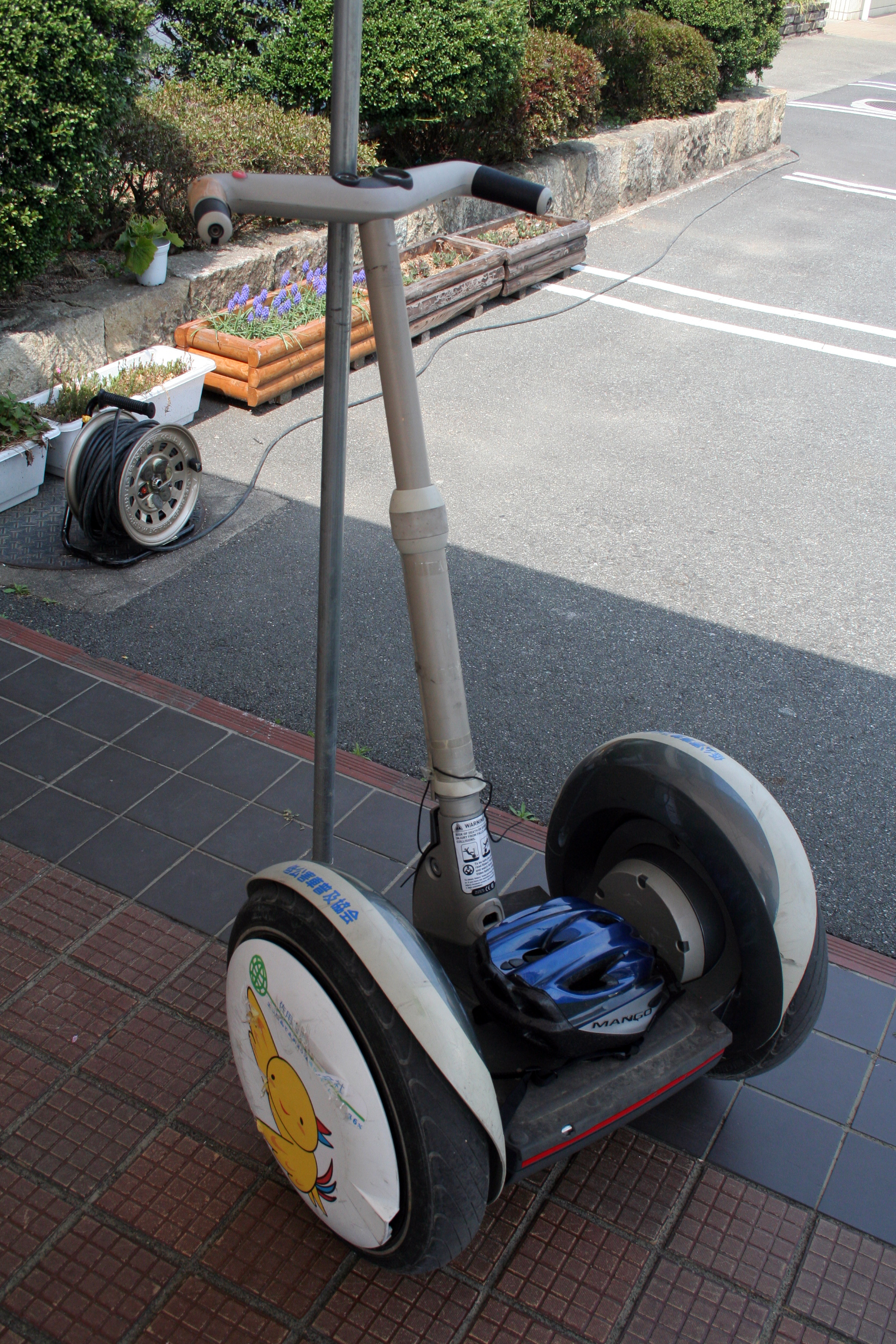 兵庫県佐用郡佐用町佐用にある佐用町役場にて2009年4月12日に開催されたカー・フェスティバル「ヴァリオ・ストラーダ2009」にて展示された自動車など。車はいずれも佐用町役場にて撮影。 セグウェイ